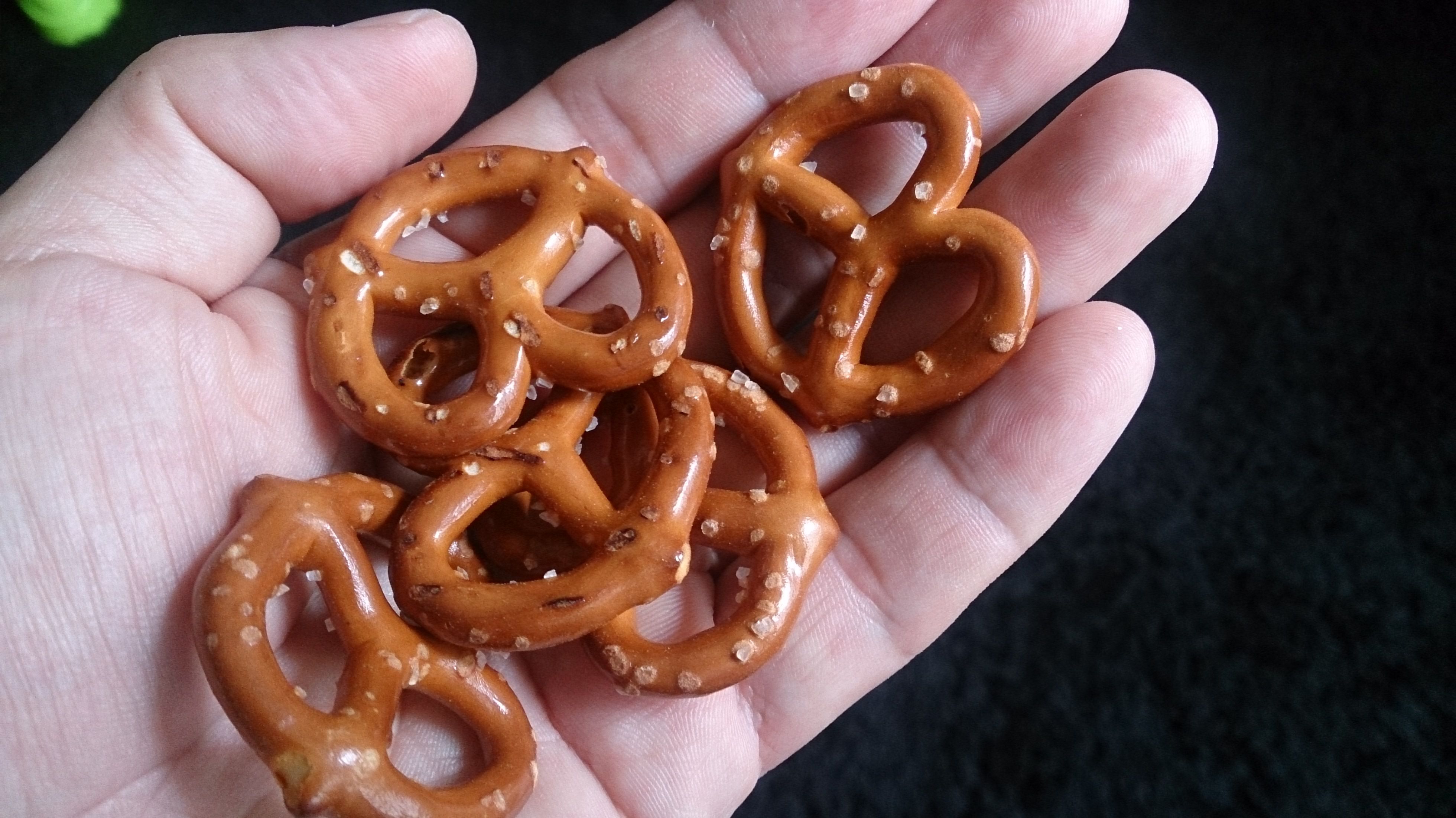 good snacks